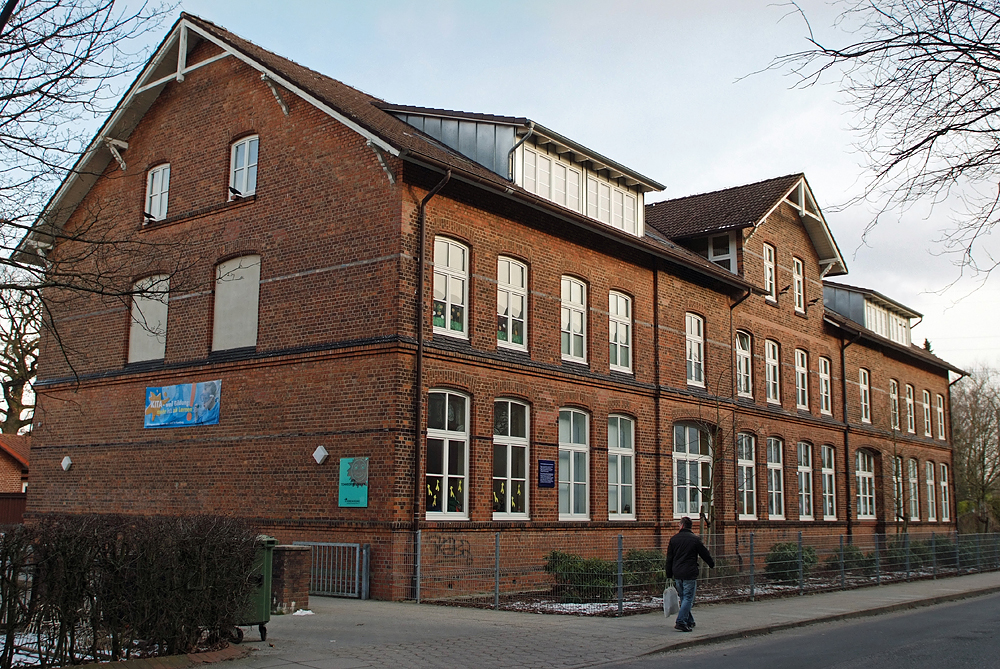 ehemaliges Grundschulgebäude(jetzt Kindergarten) Tonndorfer Schulstraße in Hamburg-Tonndorf